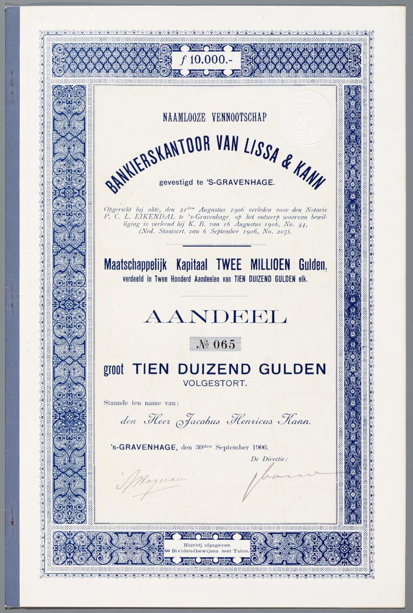 Aandeel van het NV Bankierskantoor van Lissa & Kann. Blauwe tekst en kader.